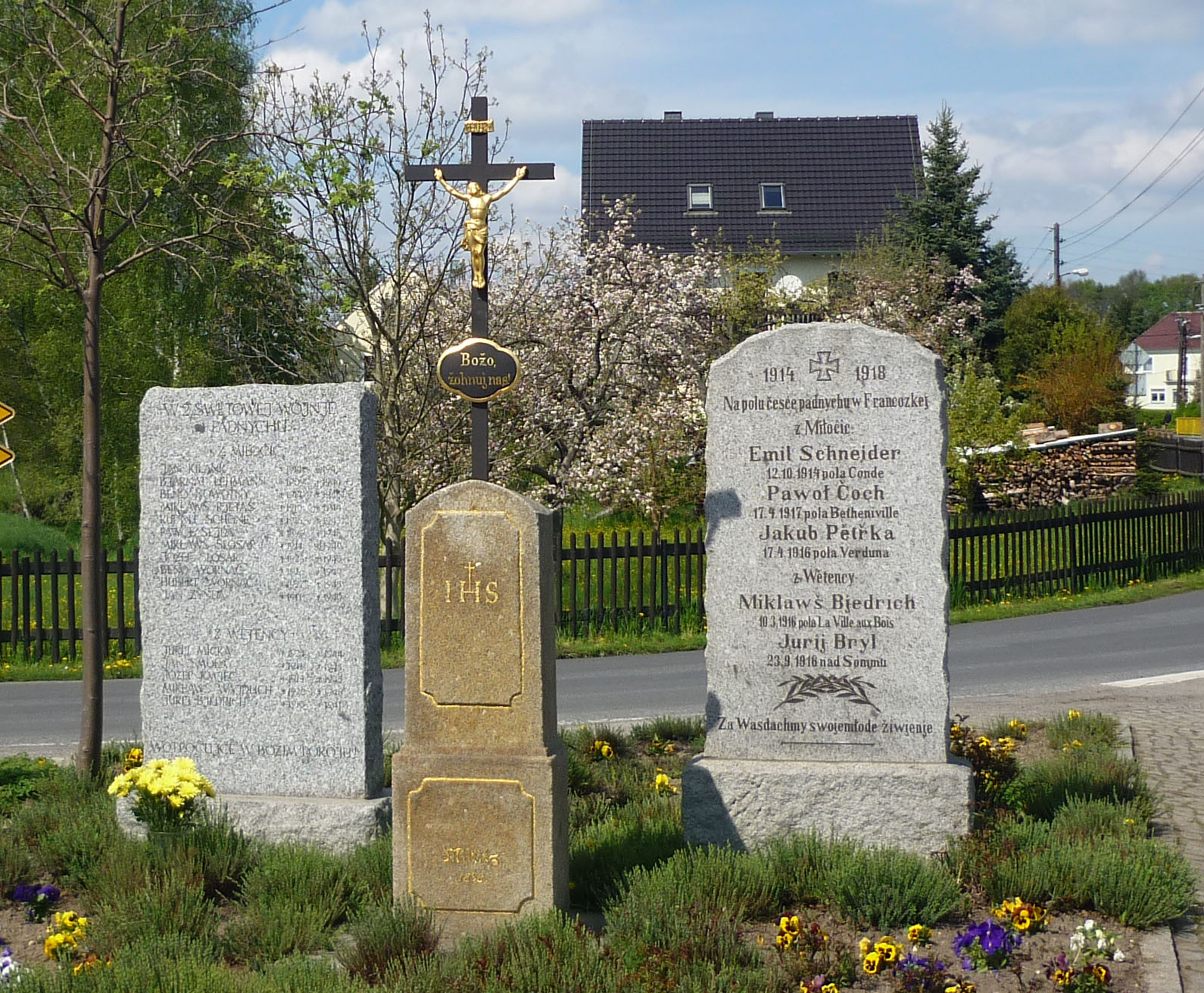 Wegkreuz in Miltitz, OT von Nebelschütz, an der Kreuzung Elstraer Str. / Dorfstr. Hornjoserbsce: Swjaty křiž a wojerski pomnik při křižowanišću Halštrowskeje a Wjesneje w Miłoćicach.